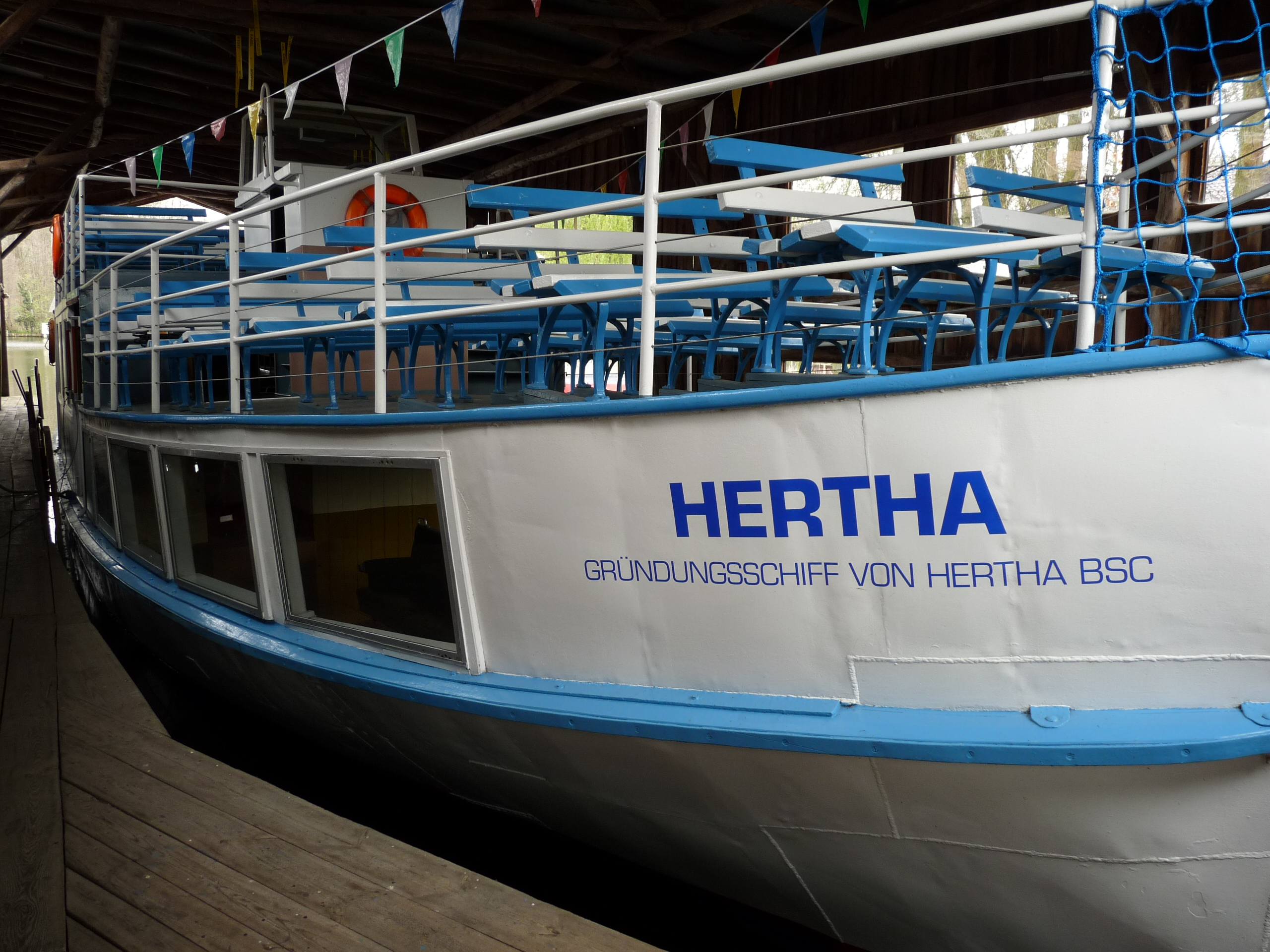 Bugbereich mit dem Schiffsnamen.